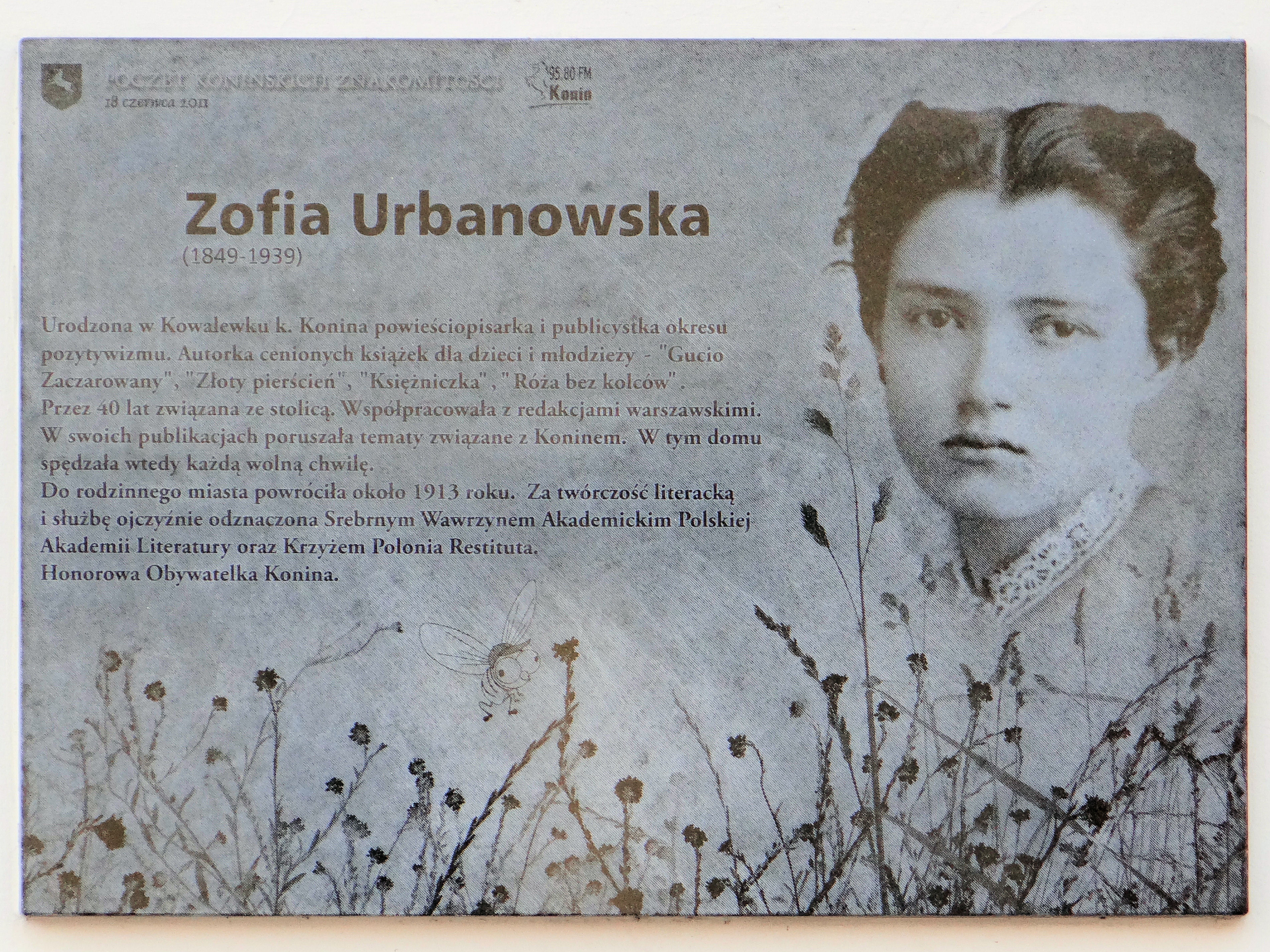 Zabytkowy dworek Zofii Urbanowskiej przy ulicy Obrońców Westerplatte 2 w Koninie